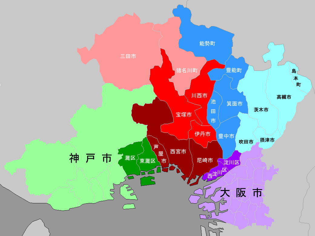 阪神間（大阪市と神戸市の中間に当たる地域）の解説図。CraftMAPの白地図を利用して作成。